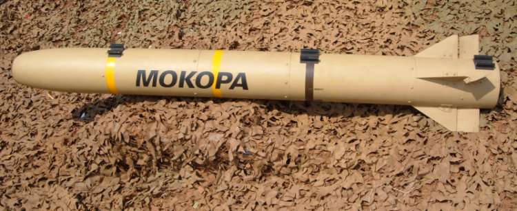 Południowoafrykański przeciwpancerny pocisk kierowany Mokopa